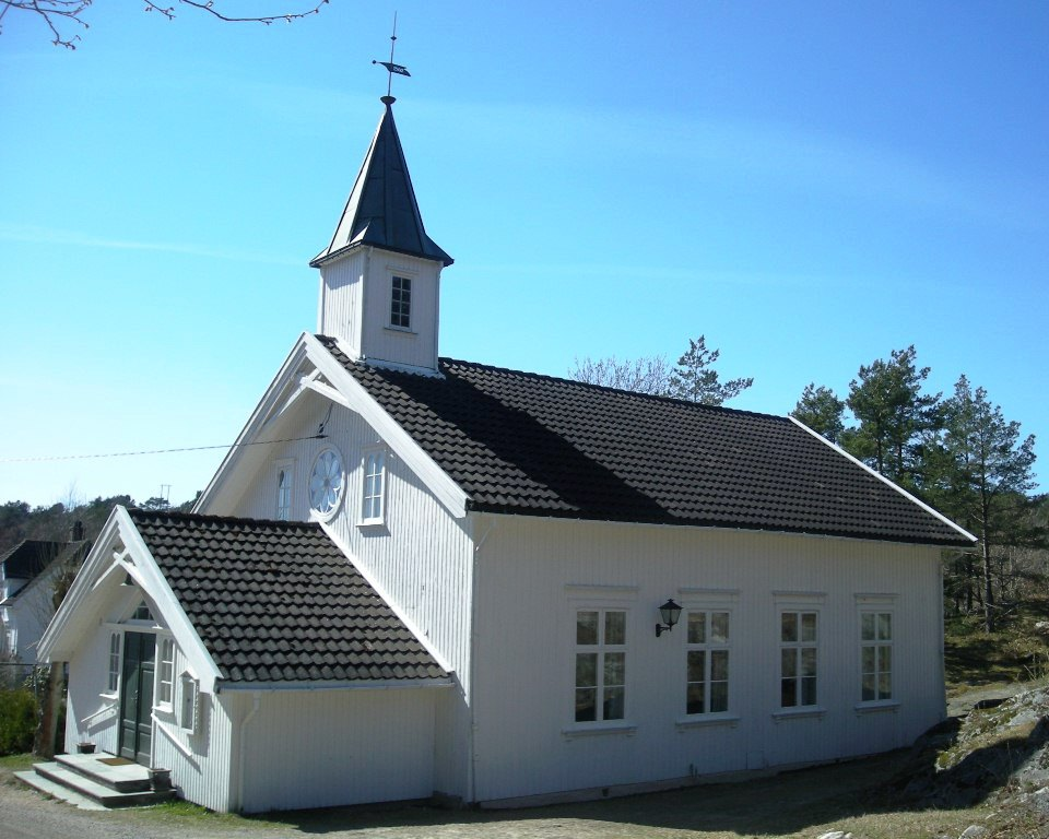 Justøy kapell (Lillesand kommune, Aust-Agder)